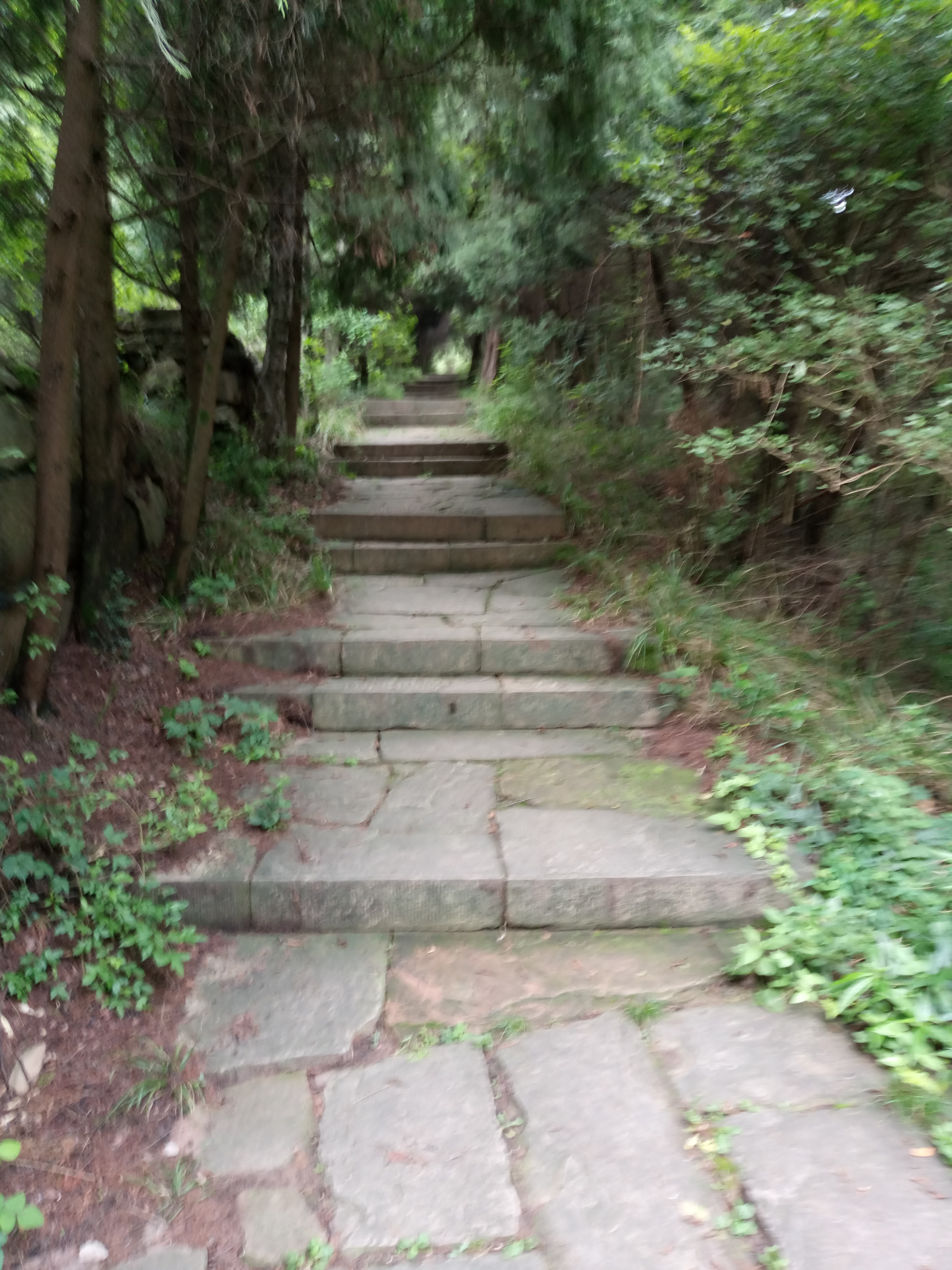 中文（中国大陆）: 剑门蜀道的一段。